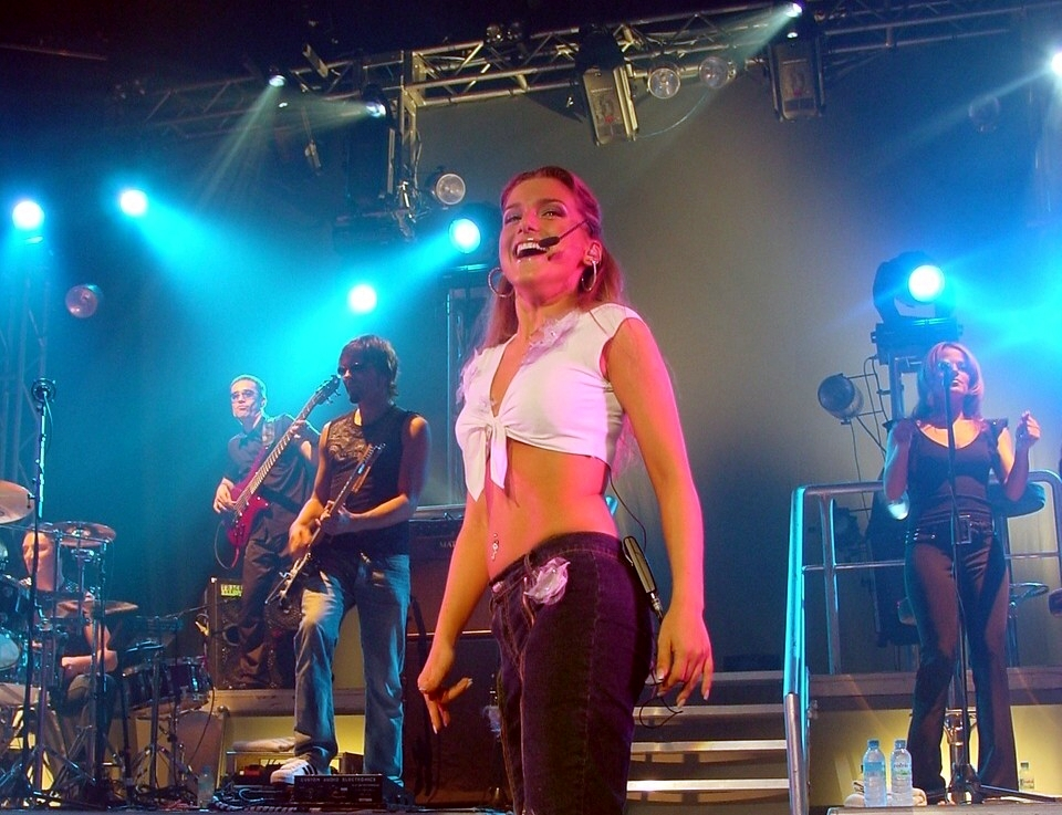 Jeanette Biedermann live im Mannheimer Capitol im Rahmen ihrer ersten zusammenhängenden Konzert-Tournee "Delicious Tour 2002"